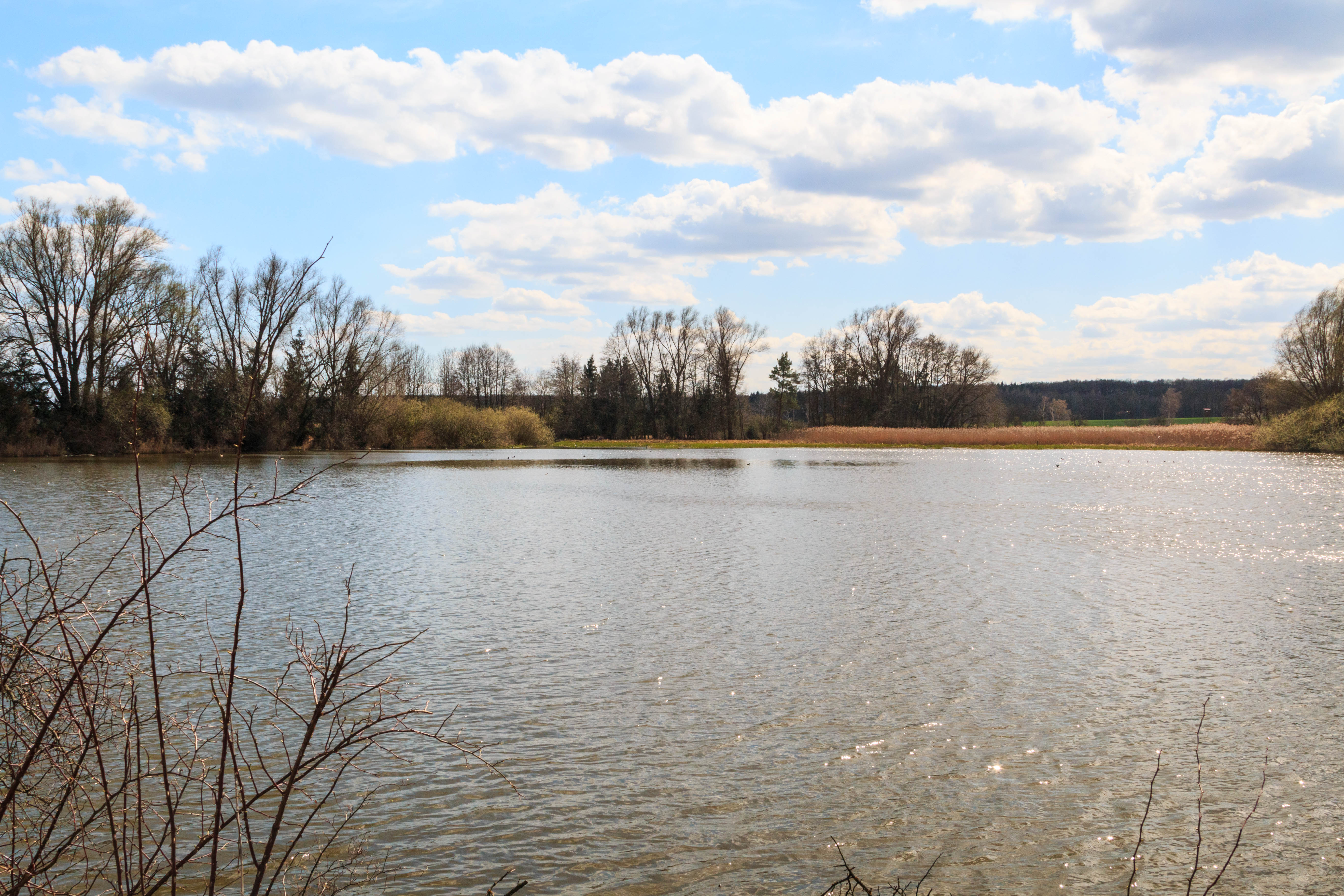 Rybník Žabí Lhotka u Lužce nad Cidlinou Project: Vodstvo.